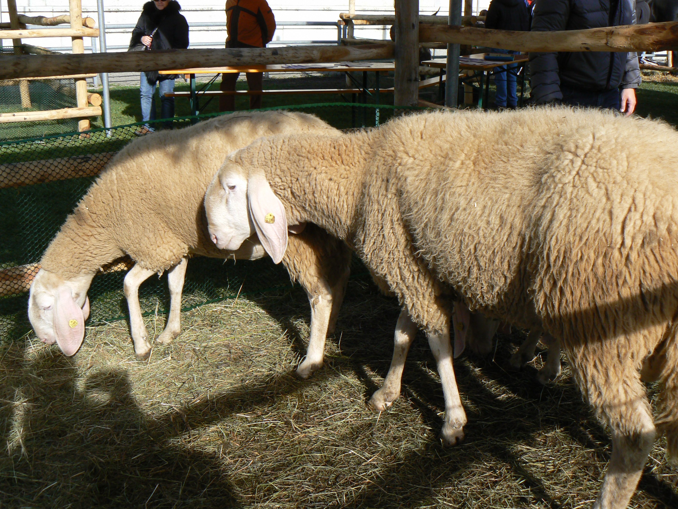 Razza ovina Bergamasca alla Fête des Alpes 2011, ad Aosta.